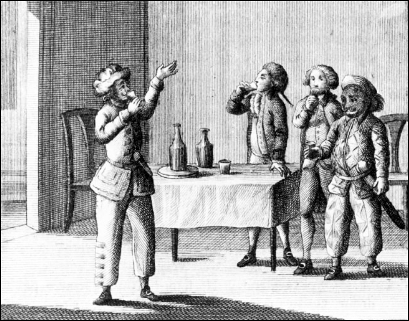 Incisione per l'edizione Zatta del 1791